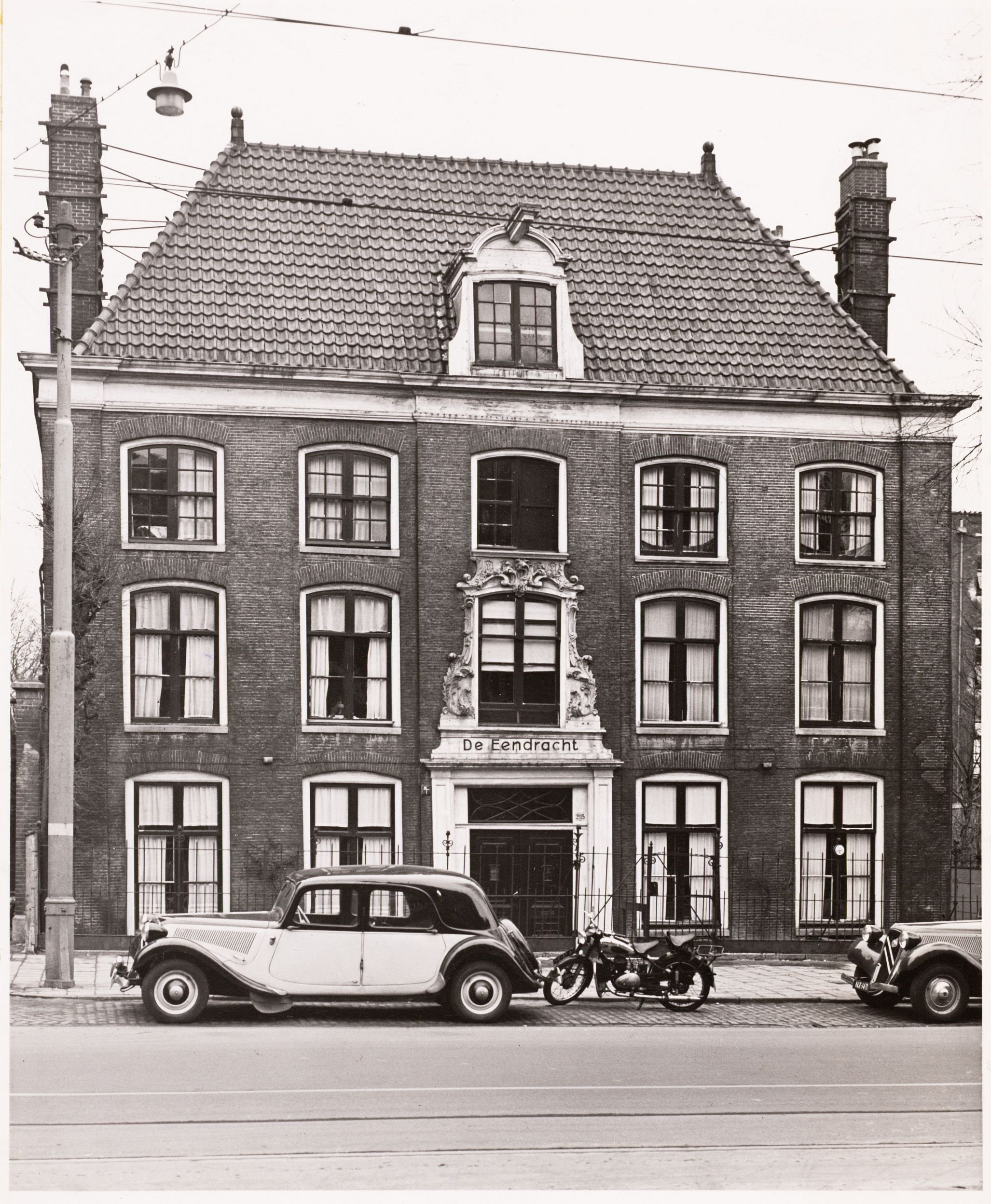 Beschrijving Het Verzorgingstehuis voor Ouden van Dagen Huize De Eendracht, Overtoom 295 Het "Gebouw de Eendracht". Documenttypefoto VervaardigerDienst Publieke Werken; afdeling Stadsontwikkeling CollectieArchief van het Bureau Monumentenzorg: glasnegatieven en negatiefloze foto's Datering 1940 ca. Inventarissen Afbeeldingsbestand 012000005445